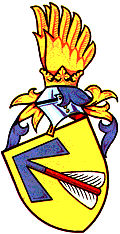 Erb šlechtického rodu Bavorů ze Strakonic